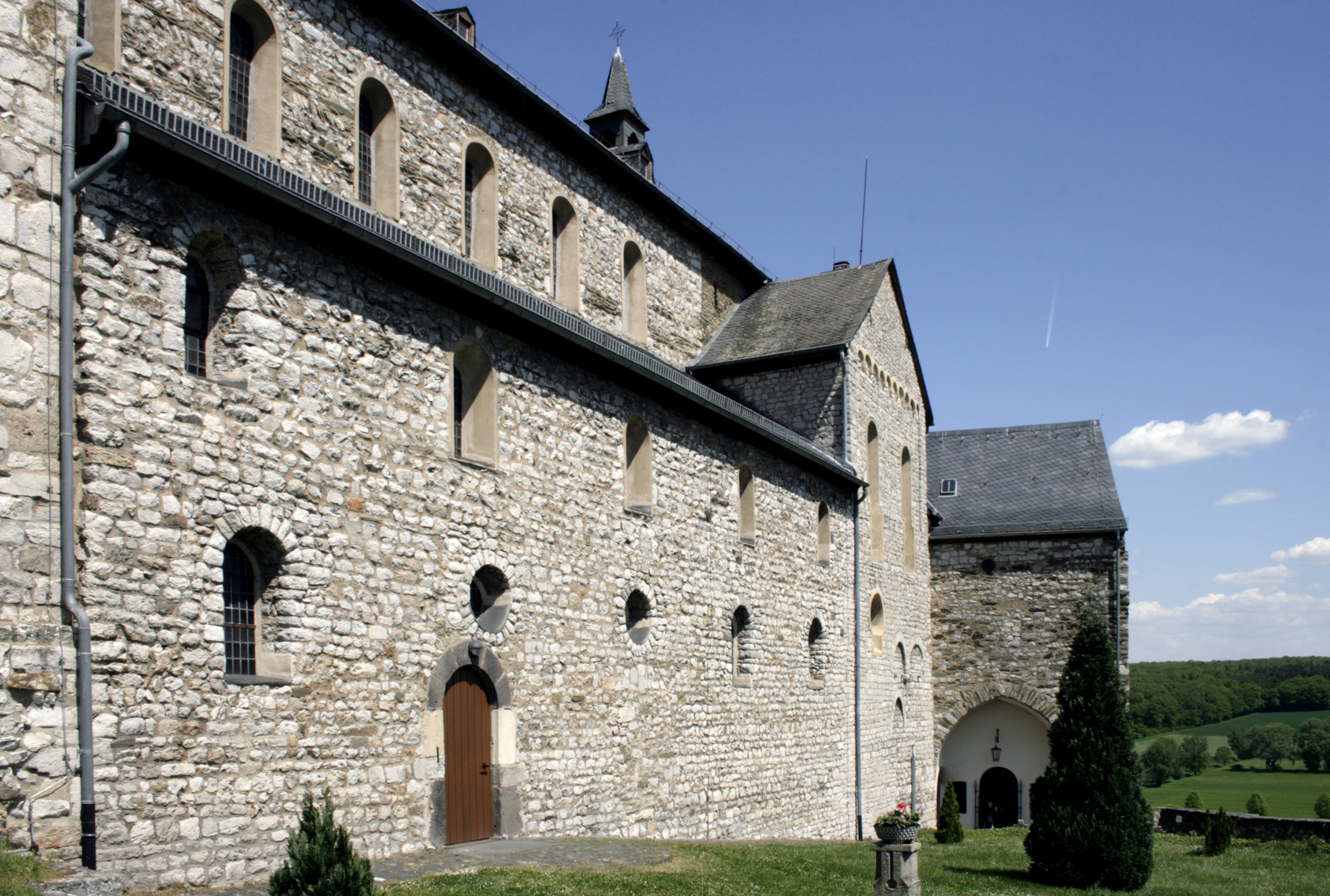 Lubentiusstift Dietkirchen, Deutschland, Kirche aus Südwesten gesehen, rechts im Bild der eingang zur Dreifaltigkeitskapelle